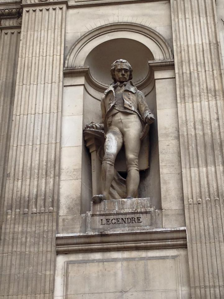 Alfred-Désiré Lanson, Legendre, Paris, hôtel de Ville